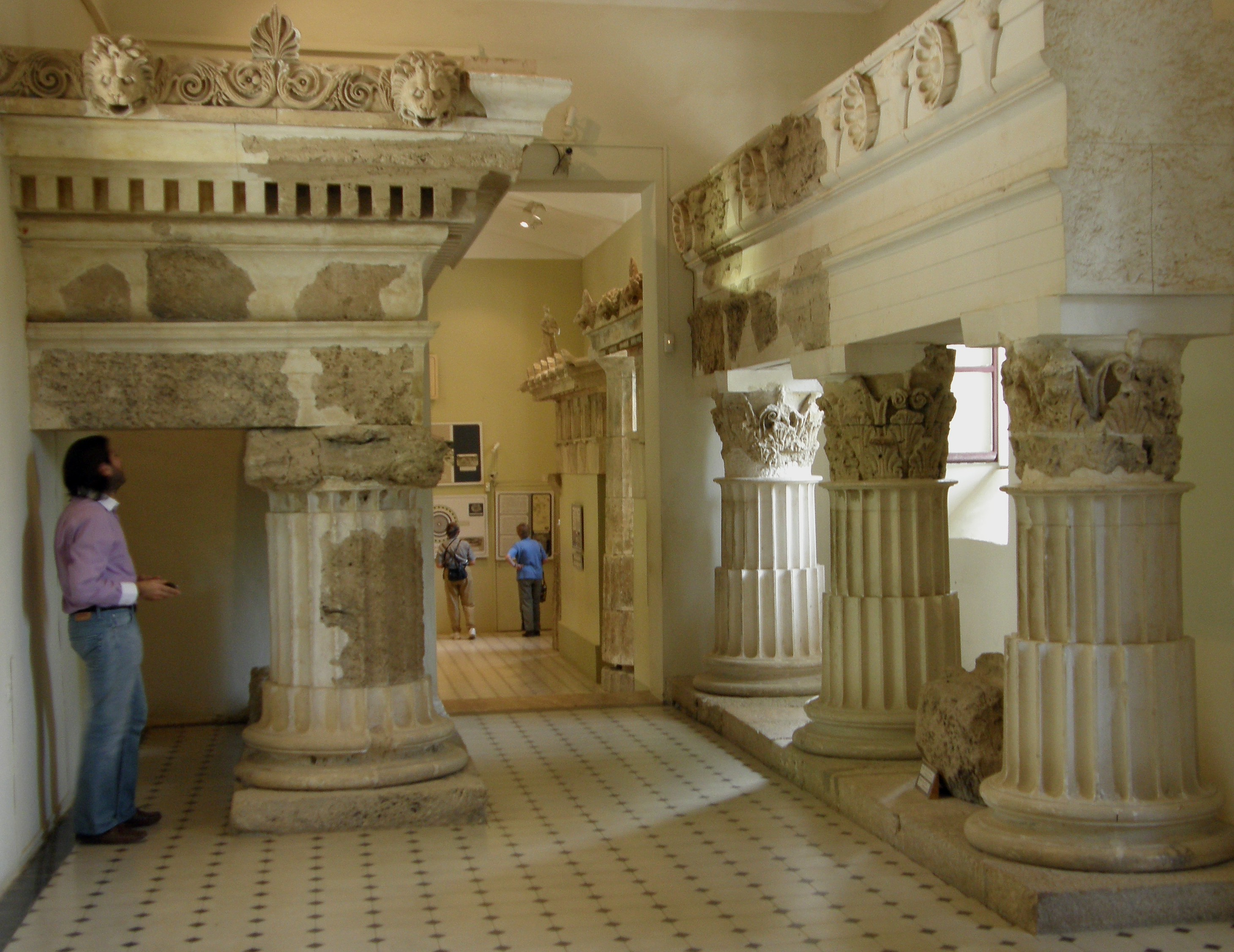 Museum Epidaurus (2)